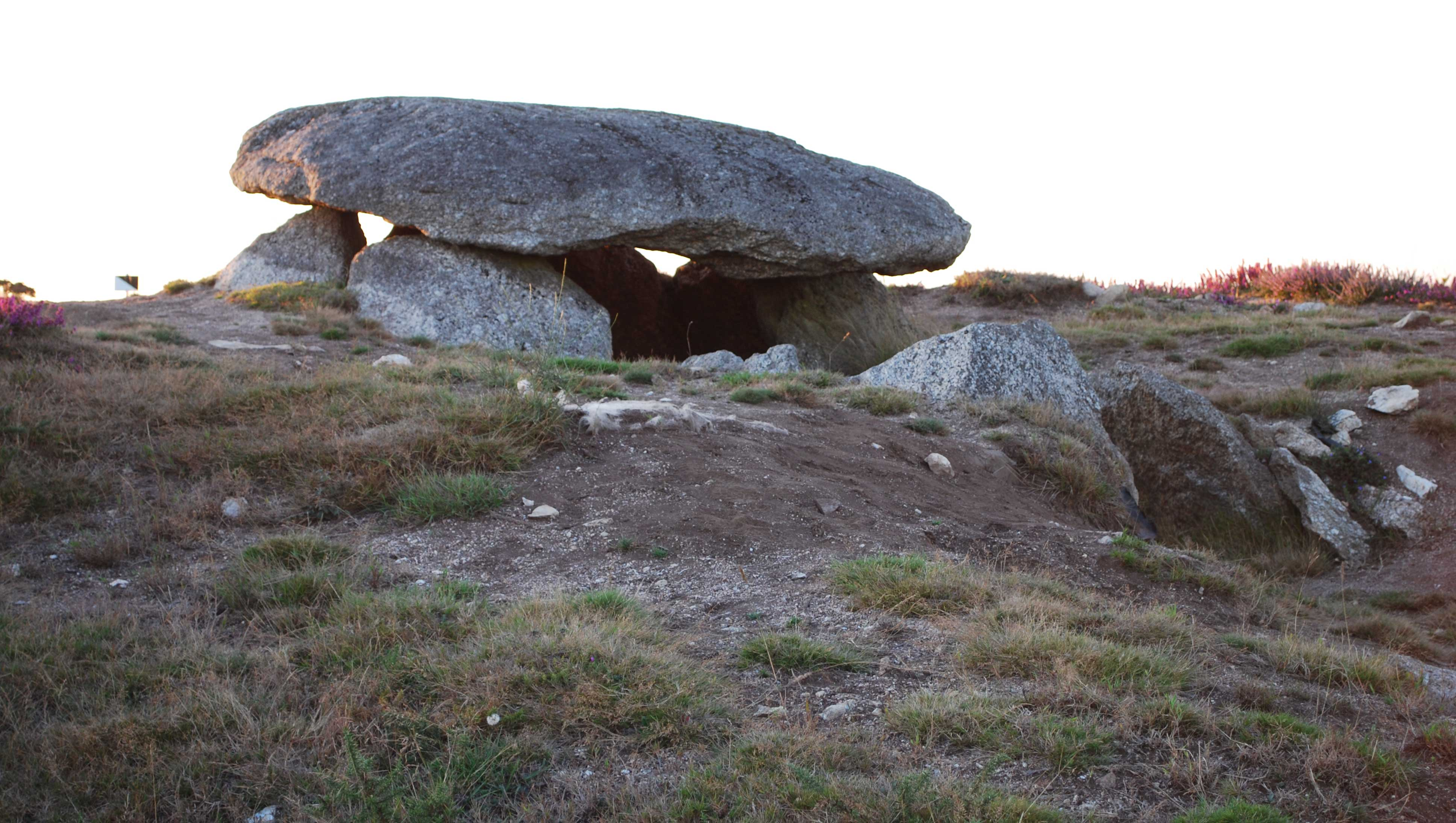 Dolmen Forno dos Mouros (A Muruxosa, Paradela, Toques).